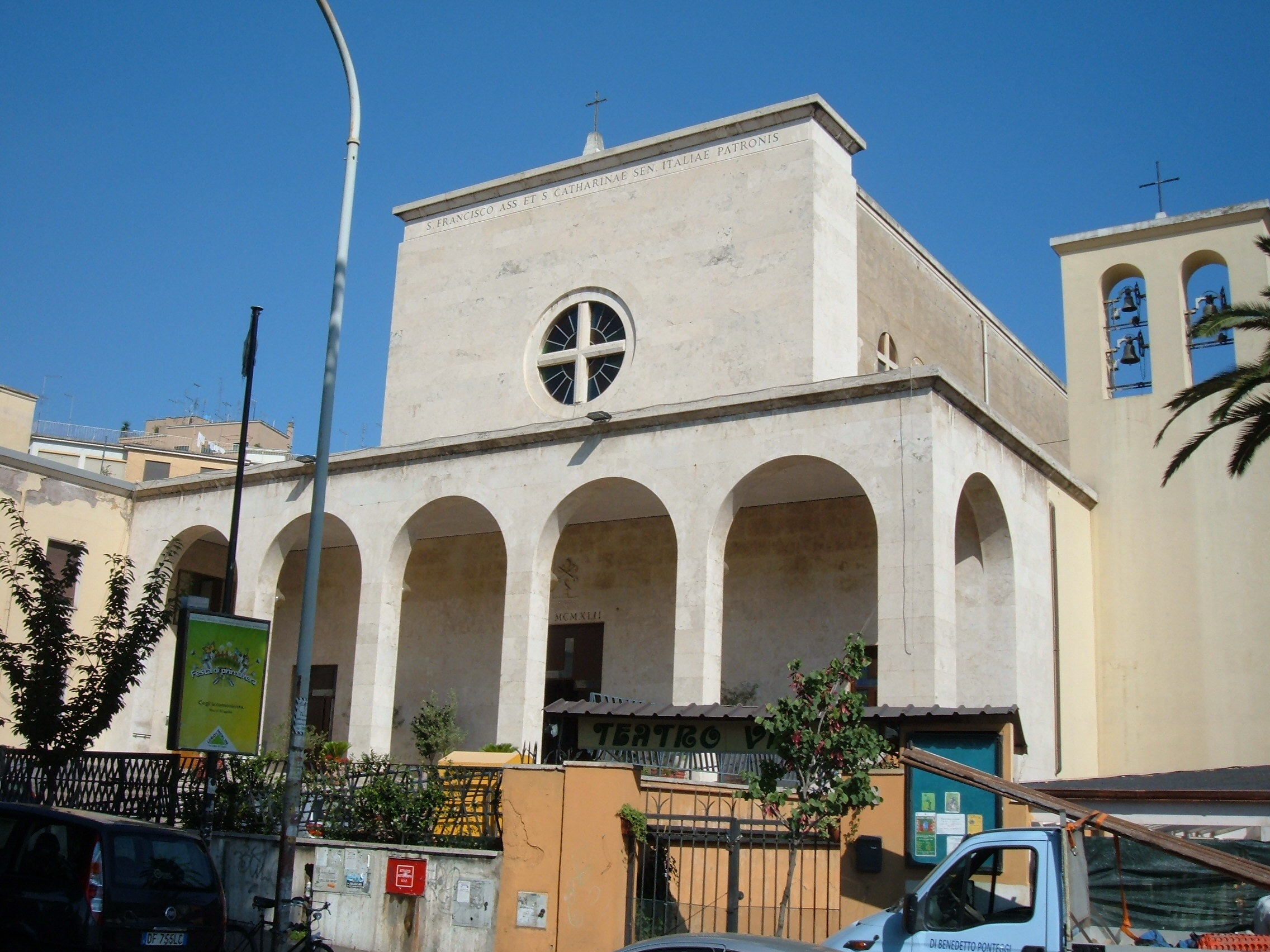 Chiesa di San Francesco d'Assisi e Santa Caterina da Siena, Patroni d'Italia, a Roma, nel quartiere Gianicolense.